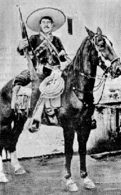 General zapatista Felipe Neri Jimenez